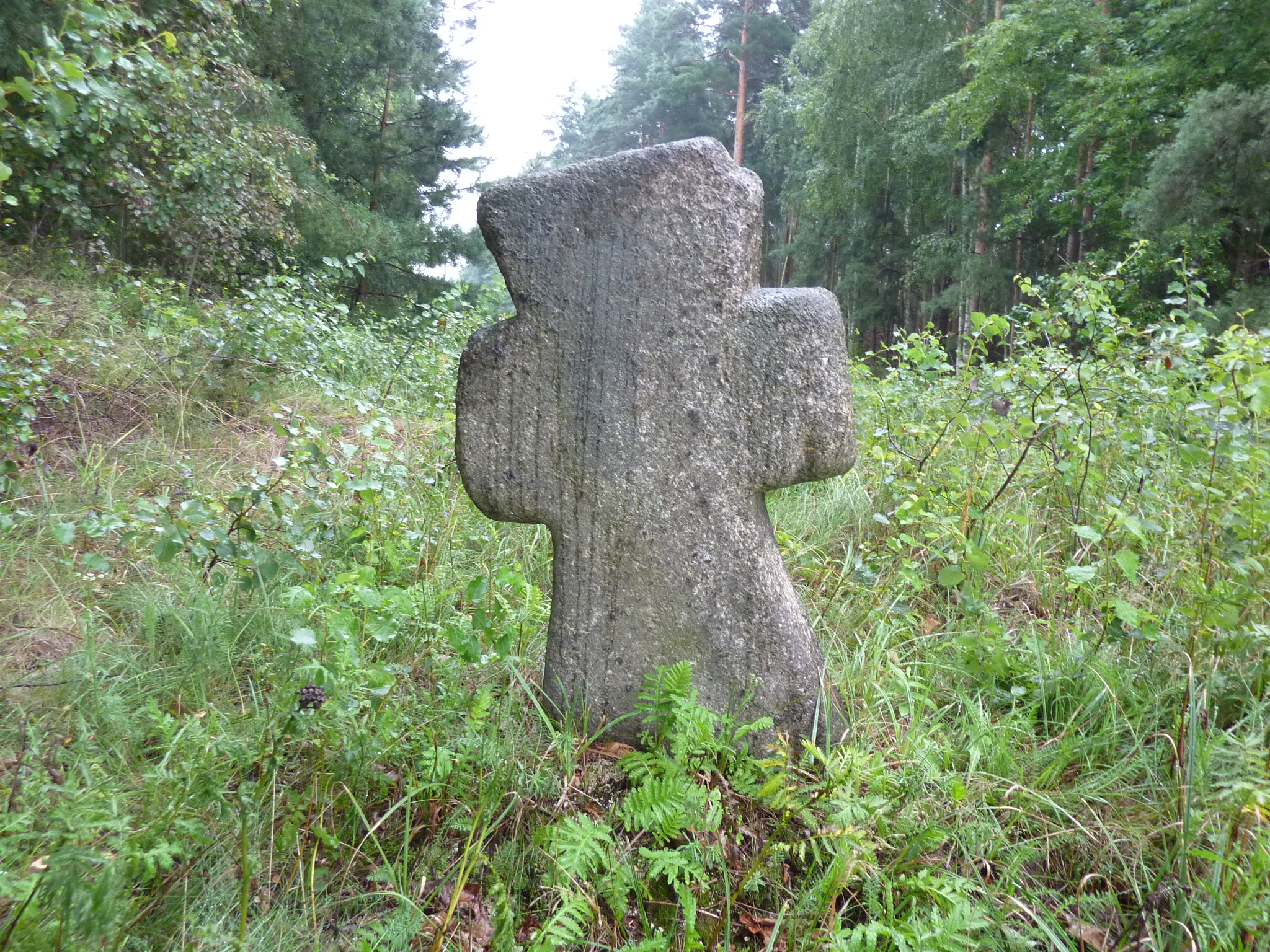 Sühnekreuz in Greifenhain, Ortsteil der Stadt Drebkau